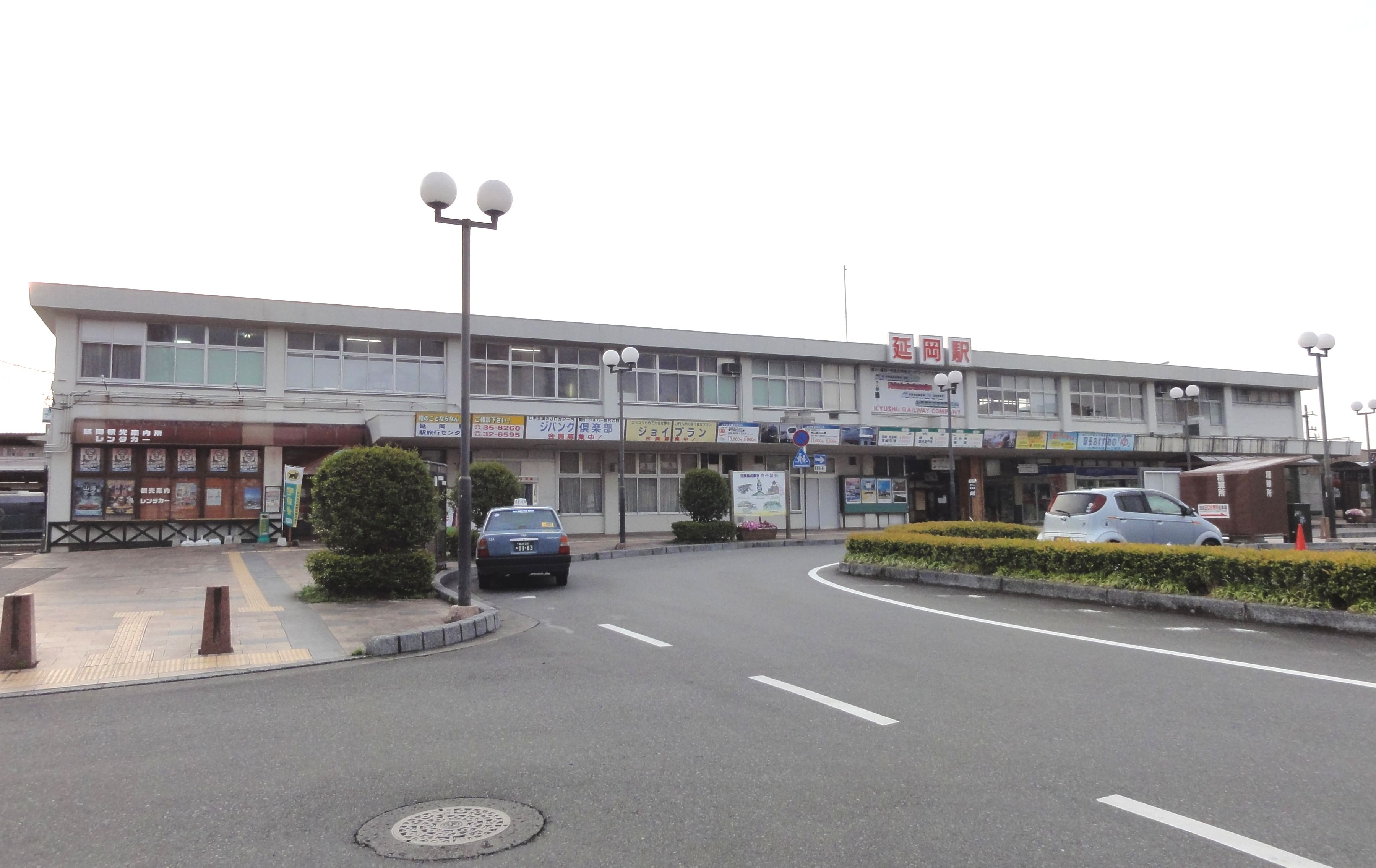 延岡駅